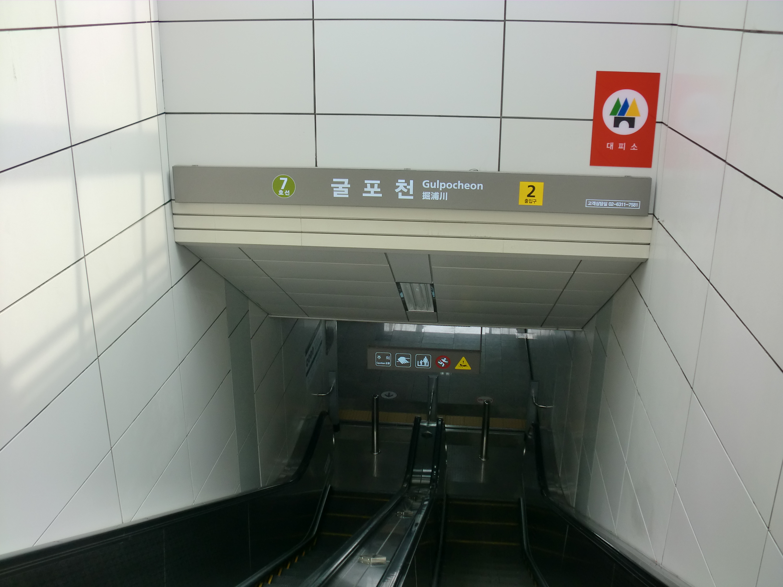 수도권전철 7호선 굴포천역 2번출구